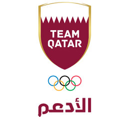 NEW LOGO FOR QATAR OLYMPIC COMMITTEE